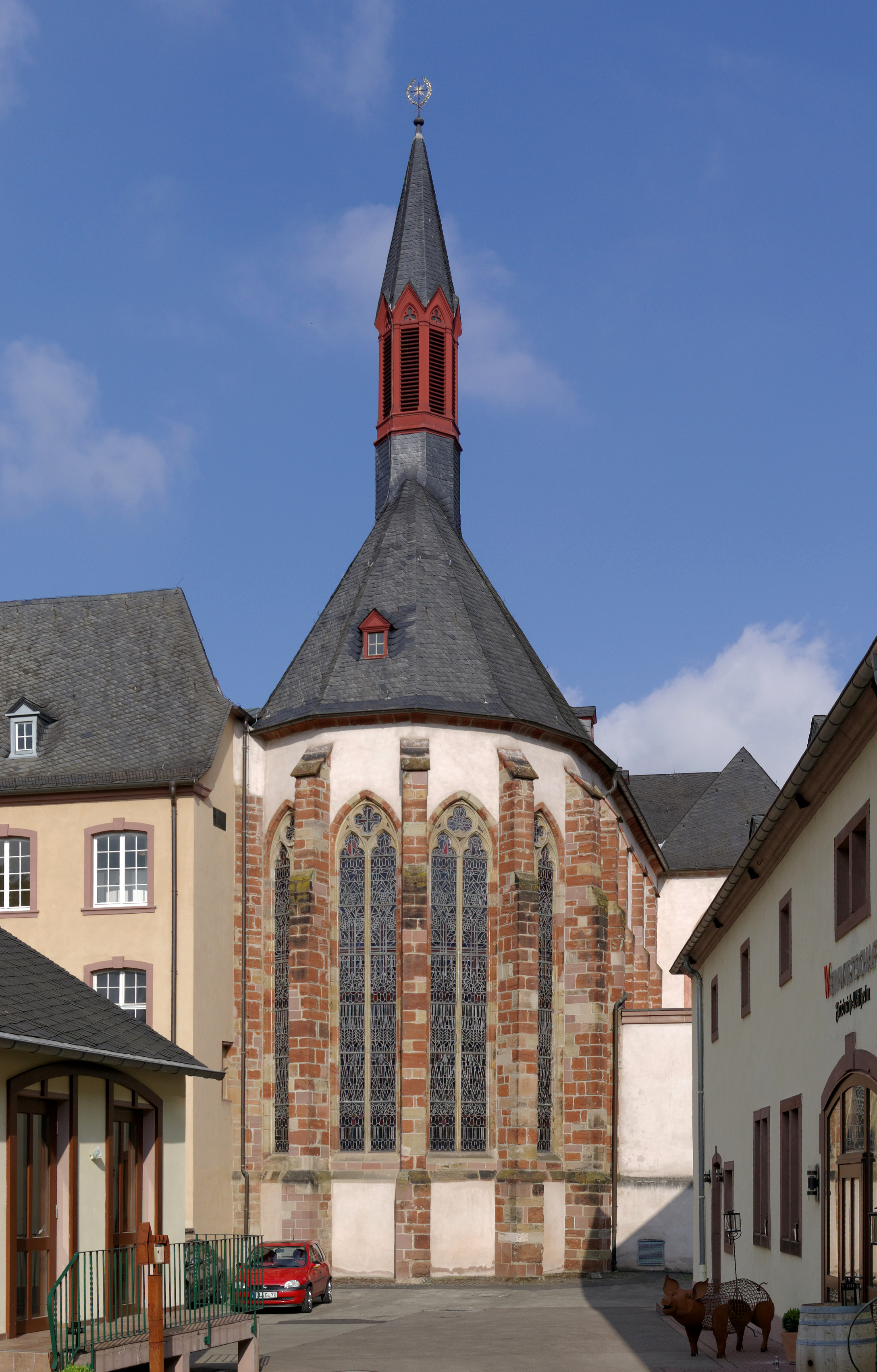 Trier, Jesuitenstraße 13, ehemaliges Jesuitenkolleg, heute Bischöfliches Priesterseminar; Bau A: die ehemalige Franziskanerminoritenkirche, spätere Jesuitenkirche zur Heiligen Dreifaltigkeit, heute Seminarkirche: dreischiffige Hallenkirche, Langchor um 1230/40, zweischiffige Langhauserweitung im dritten Drittel des 13. Jahrhunderts, gotisierendes Südseitenschiff 1739–42, Nebenchöre 1740/41 bzw. 1742/43; Ausstattung